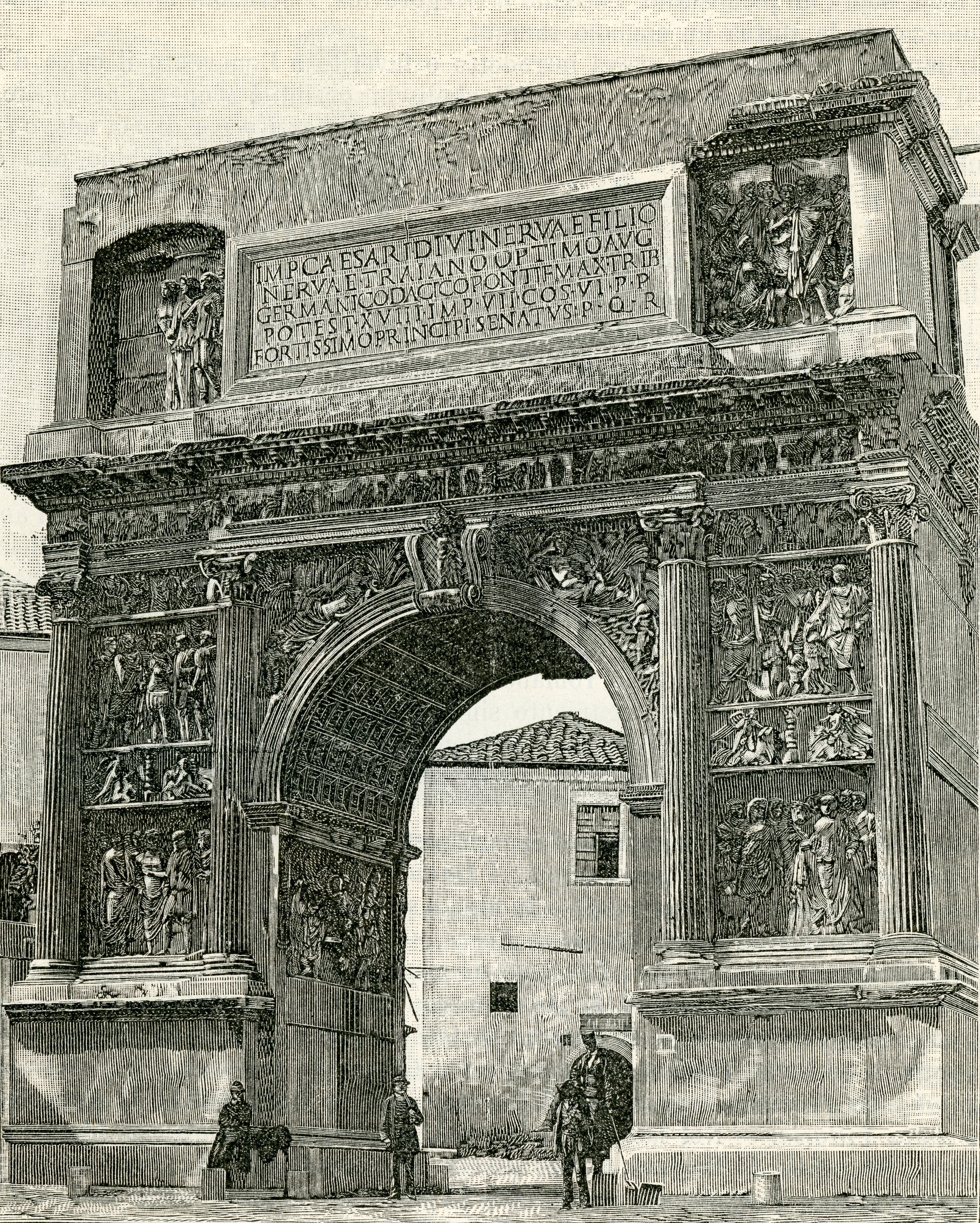 Benevento: arco Trajano veduto dalla campagna (incisore anonimo 1898).